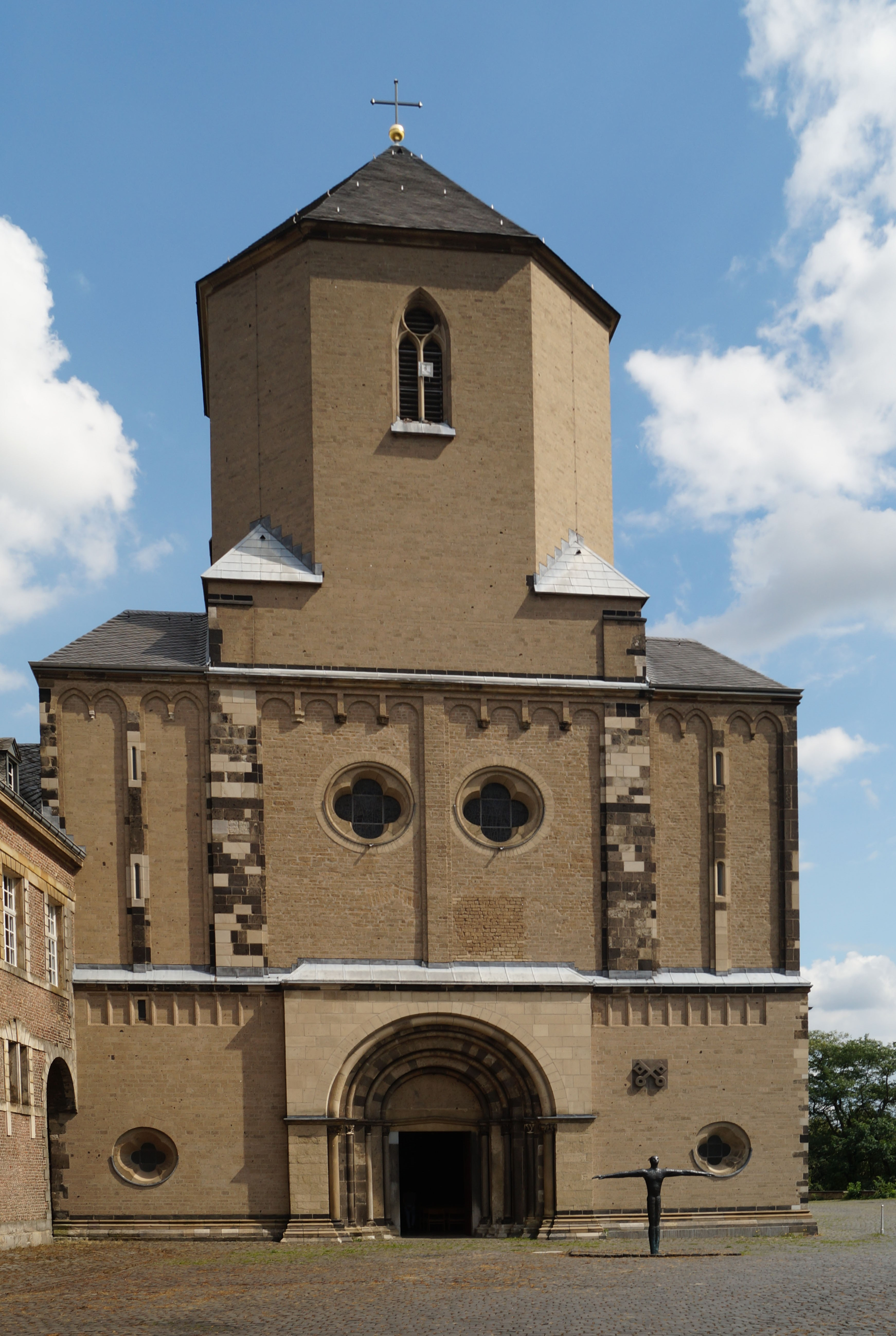 Mönchengladbacher Münster Westansicht